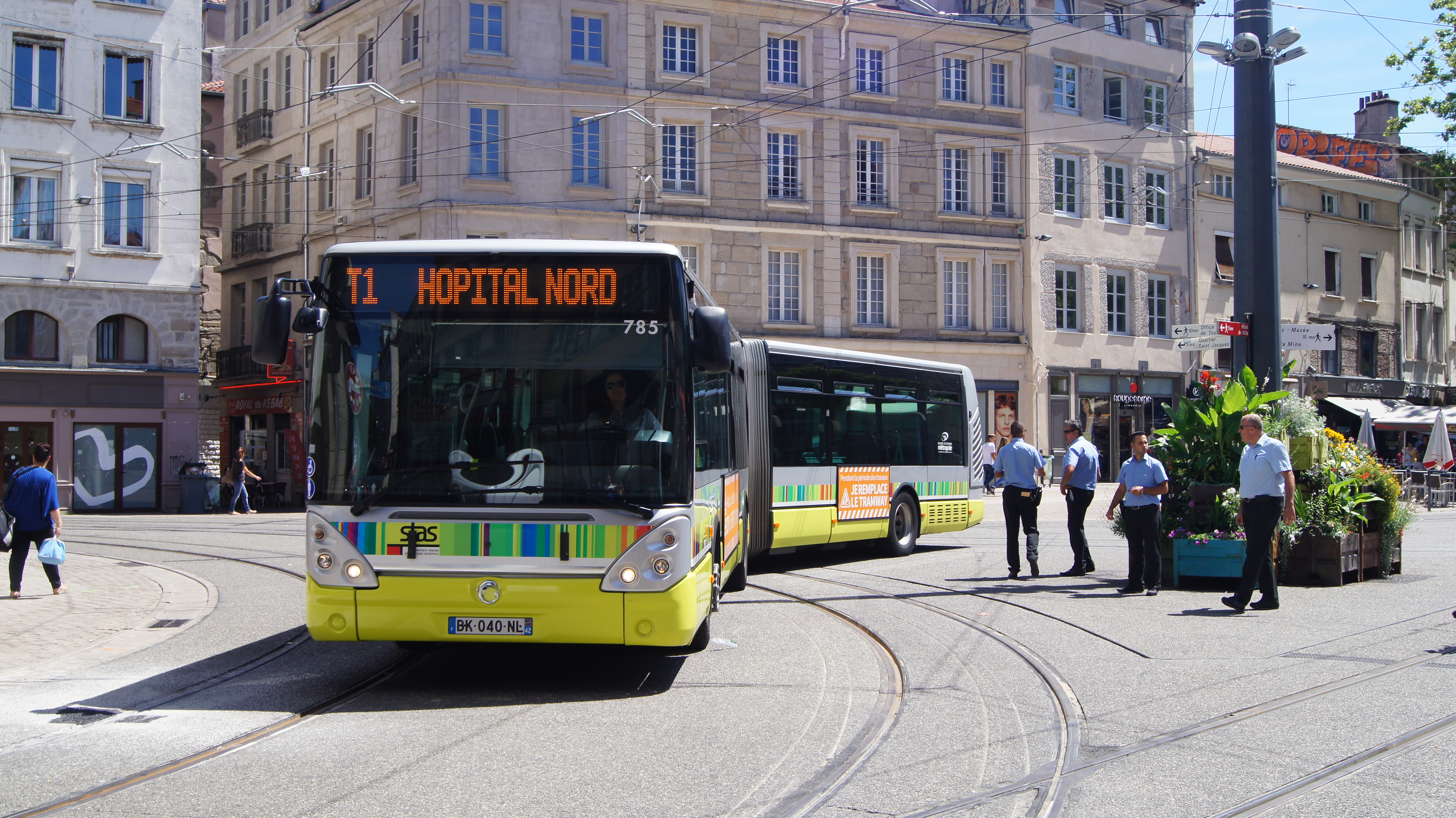 Irisbus Iveco Citelis 18 N°785 pendant un remplacement tramway été 2016